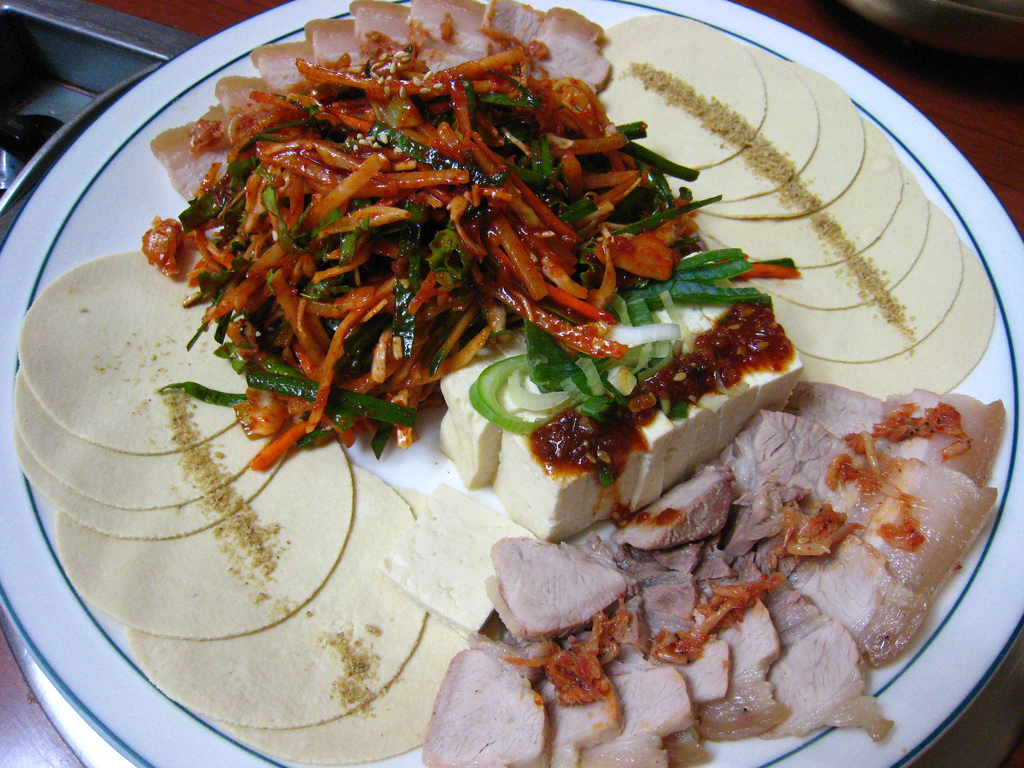 Bossam, Korean dish